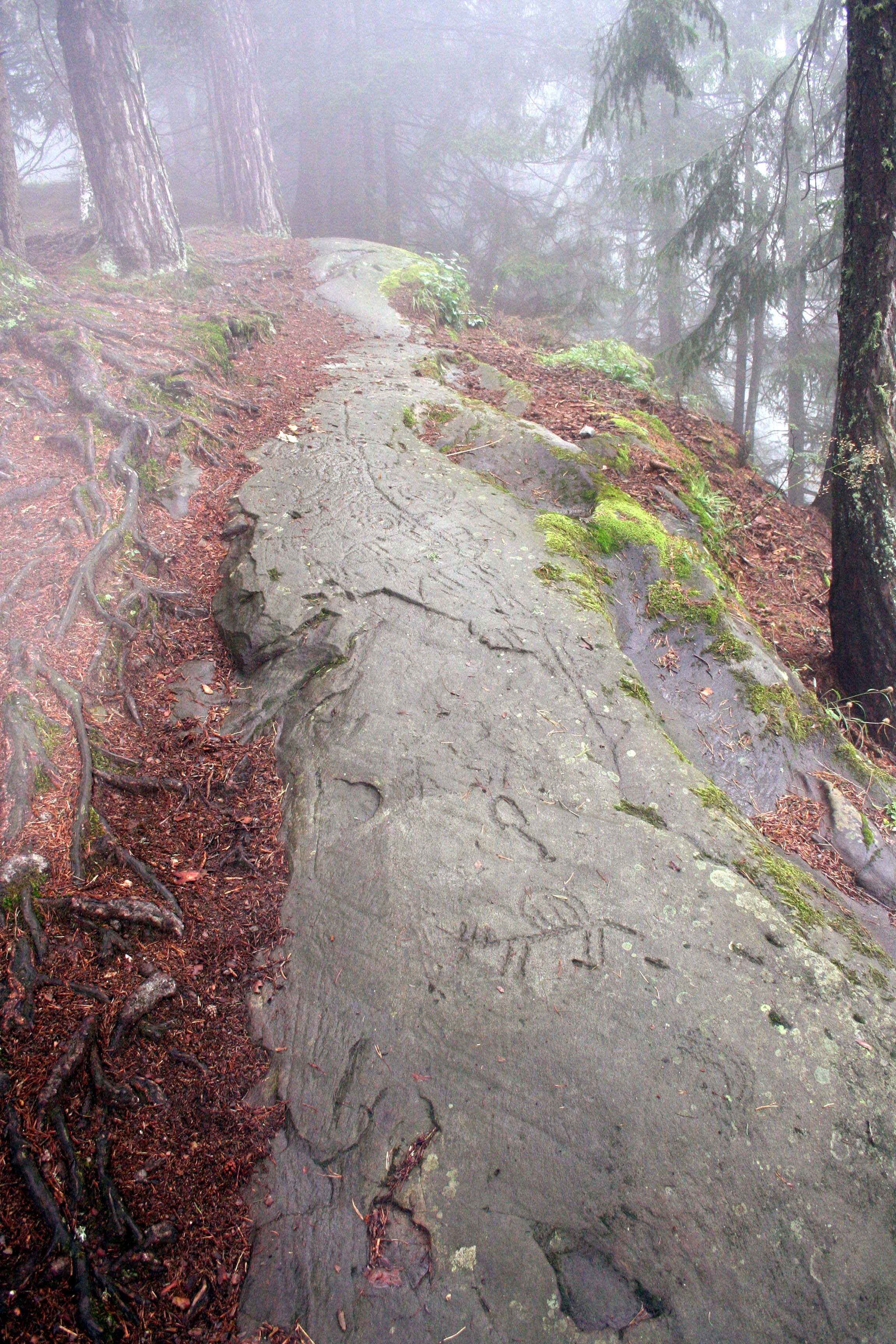 Felszeichnungen Carschenna, Switzerland GR